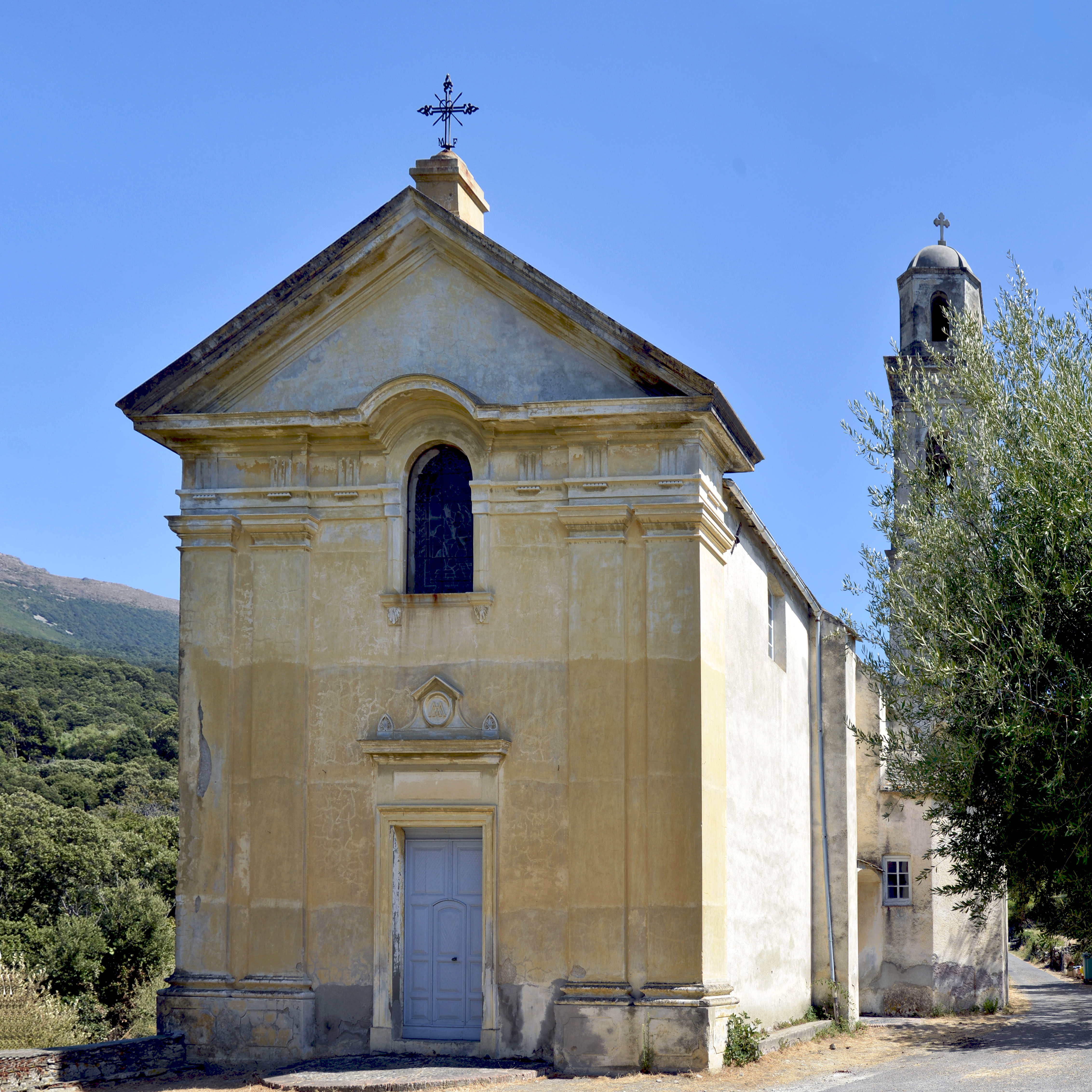 Barrettali, Cap Corse - L'église de l'Annonciation (Annunziata) de Conchigliu, érigée en paroisse en 1848. Vers 1870 - 1875 cette ancienne chapelle d'un petit couvent de Servites construit en 1590 et abandonné par les religieux en 1790, a été agrandie et restaurée. Le couvent resta habité jusque vers 1889.